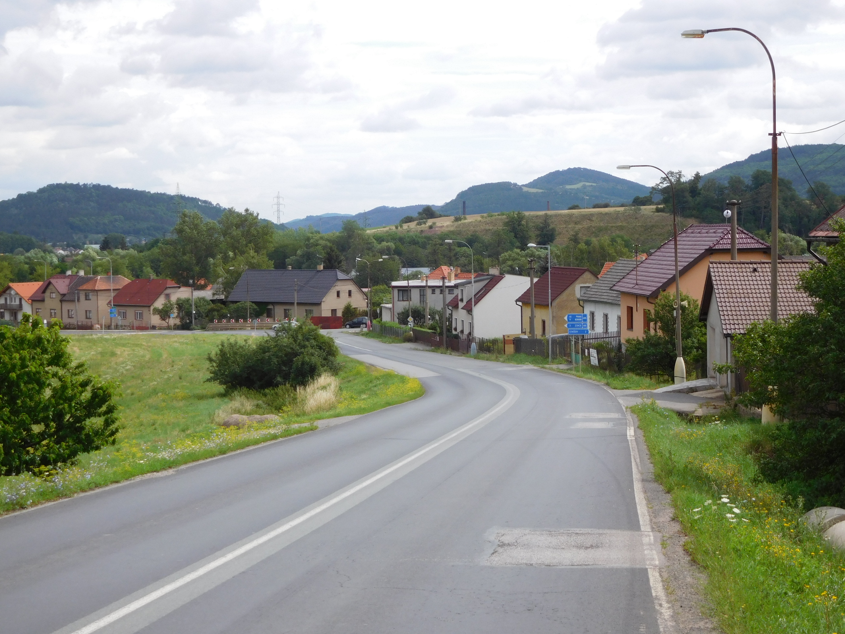 Bavoryně - Pod Průhony - silnice II/605